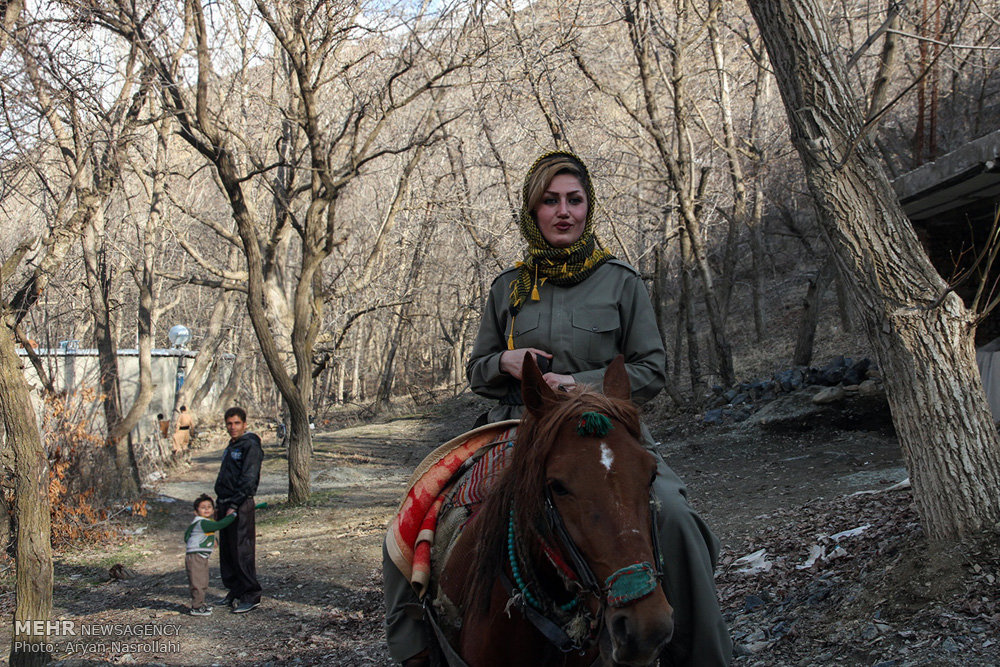 جشن نوروز به عنوان یکی از آیین های قدیمی در روزهای نخستین سال در مناطق شهری و روستایی استان کردستان با حضور و استقبال پرشور مردم برگزار می شود. در این آیین سنتی مردم هر روستا با جمع شدن در یک مکان مشخص ضمن روشن کردن آتش با رقص محلی و خواندن آواز فرا رسیدن سال نو را جشن میگیرند. مراسم نوروز روستای بیساران به عنوان یکی از پرجمعیت ترین و بزرگ ترین روستاهای کشور با حضور مردم روستا و شماری از هنرمندان کردستانی برگزار شد.